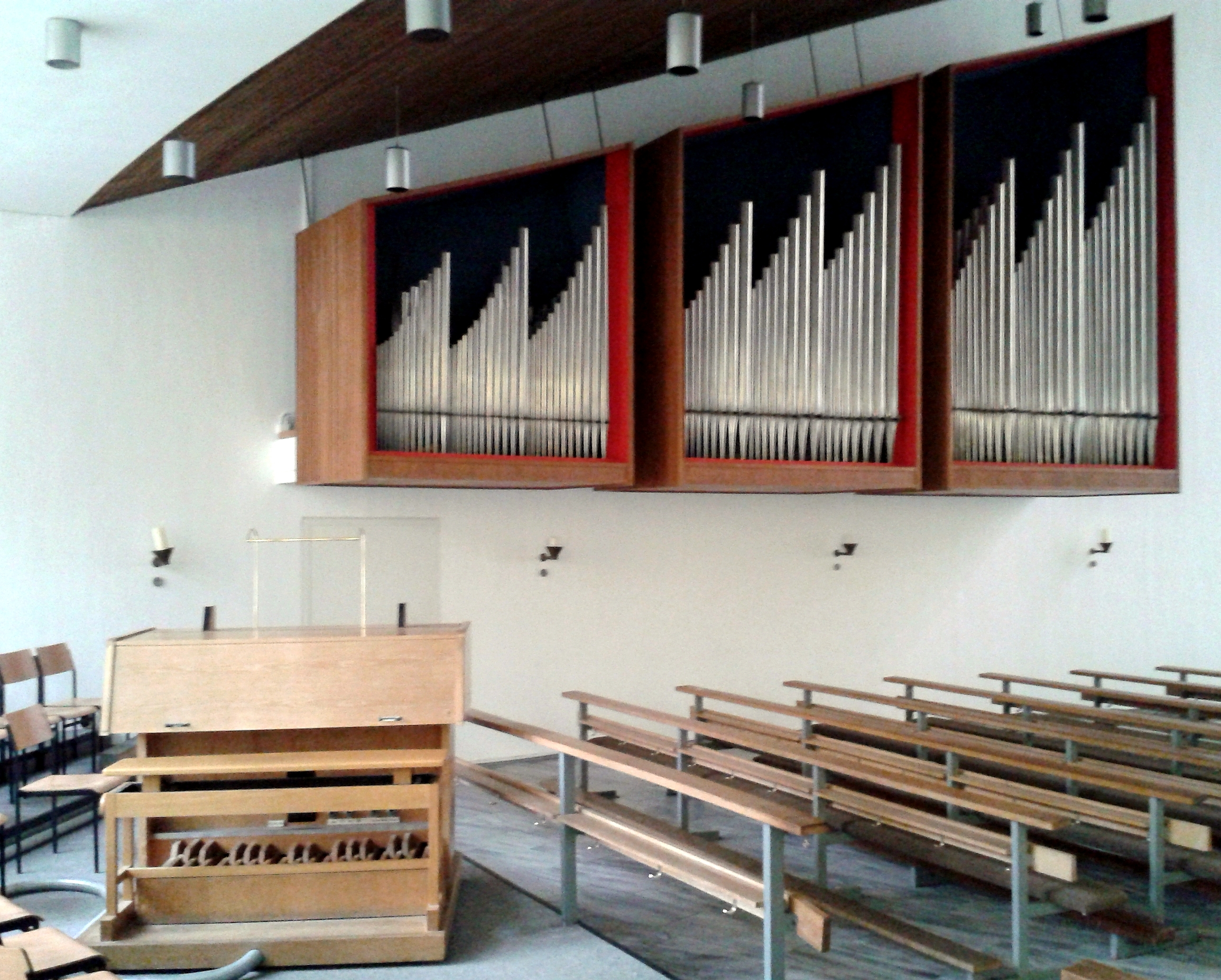 Orgel in St. Gregorius Aachen-Burtscheid